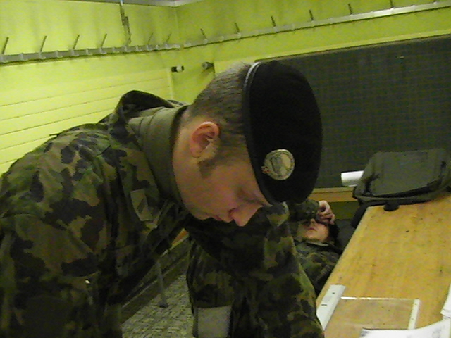 obergefreiter der schweizer armee